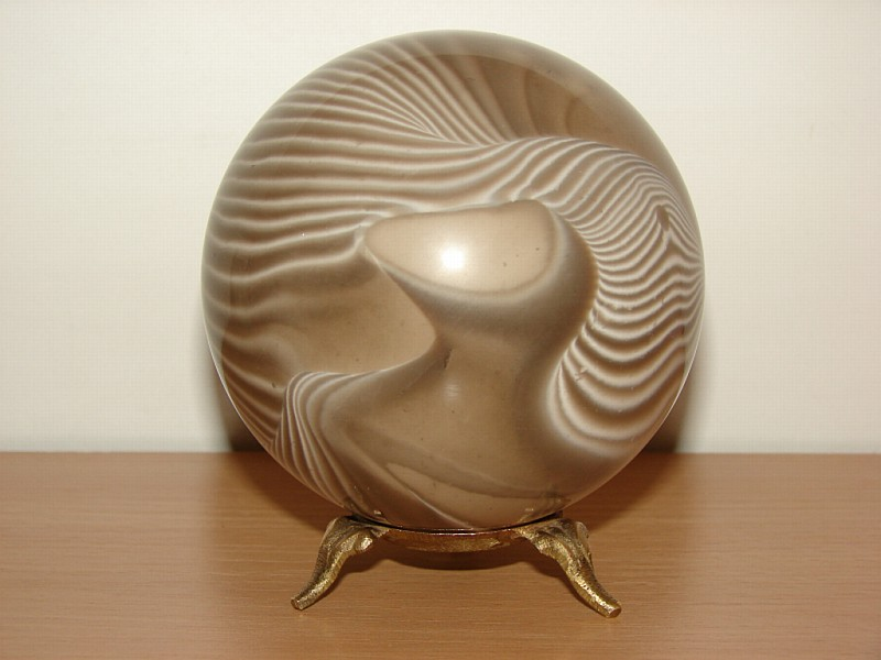 Kula z krzemienia pasiastego o średnicy 90mm, Góry Świętokrzyskie